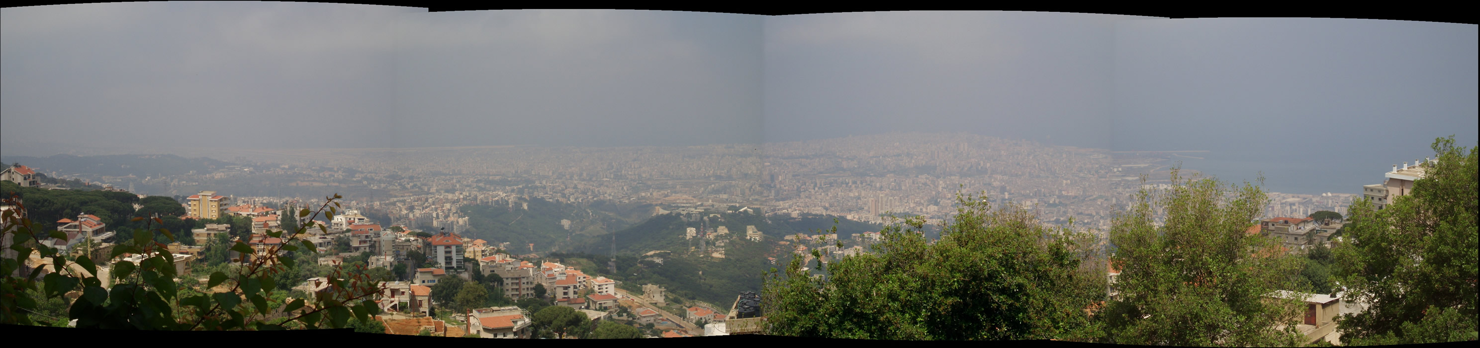 Panoramique de Beyrouth